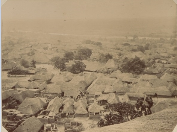 Abeokuta à distância com rio Ògùn ao fundo.